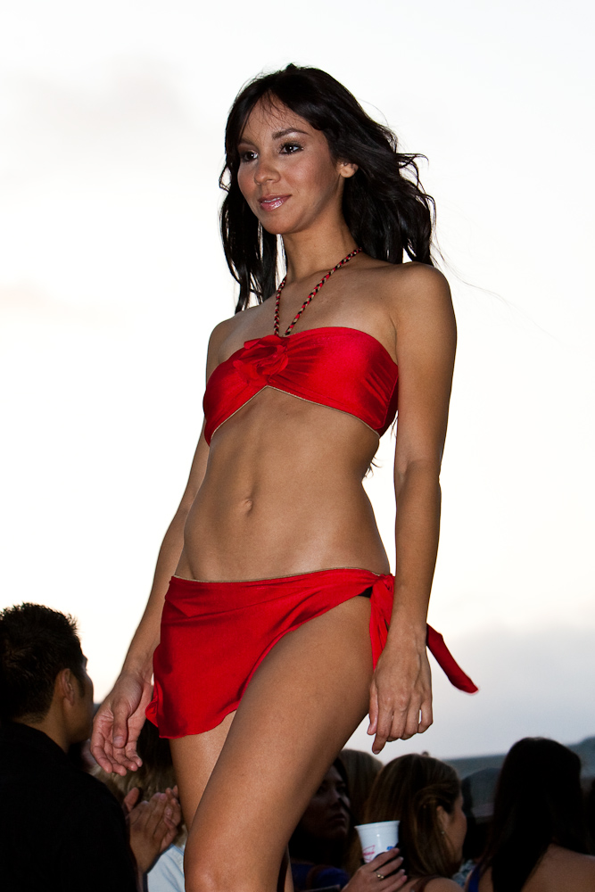 Eco-Panda Show